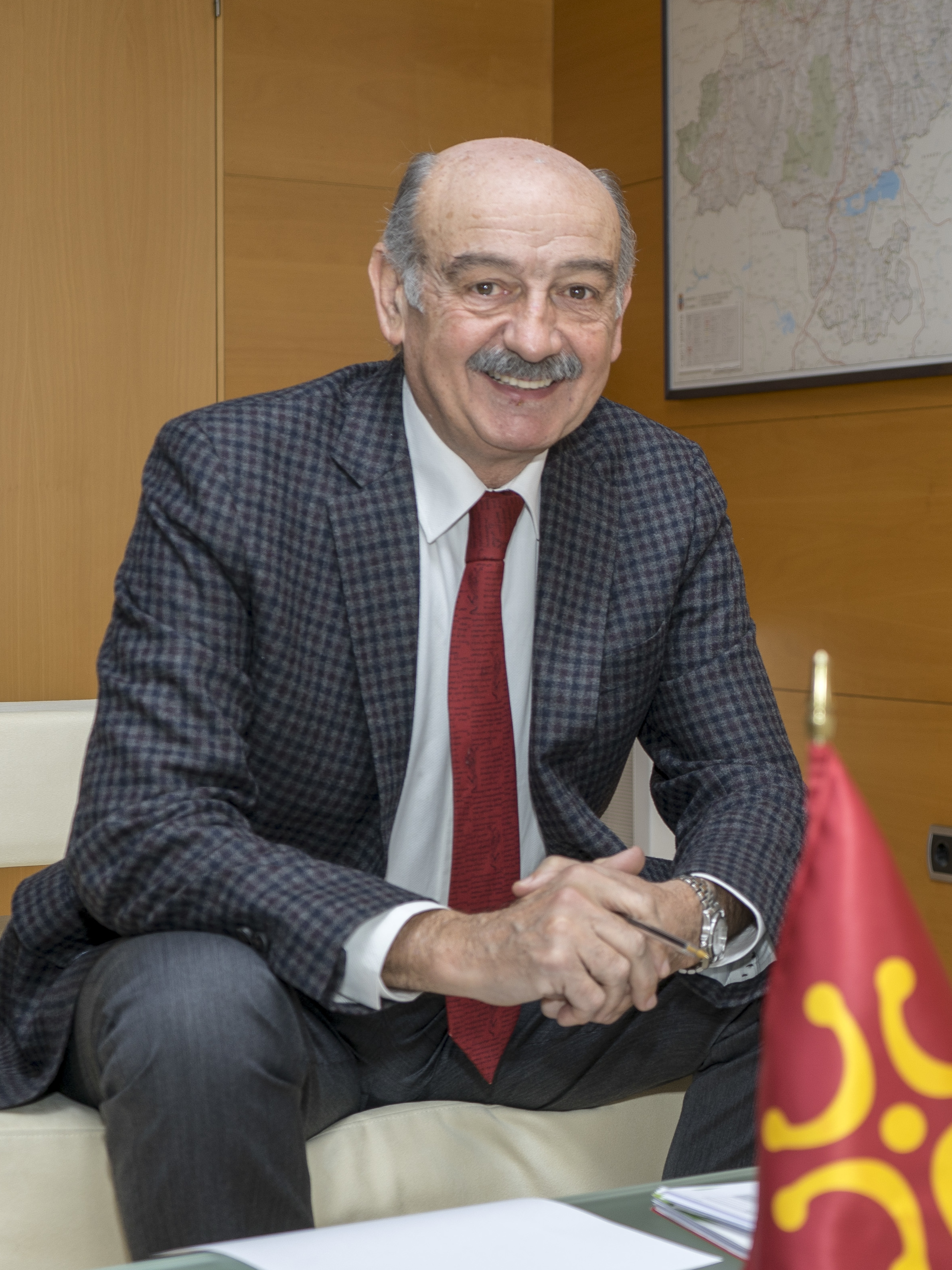 El consejero ha analizado con la alcaldesa de Polanco las necesidades del municipio en infraestructuras viarias, vivienda y seguridad vial